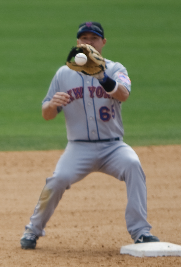 Russ Adams